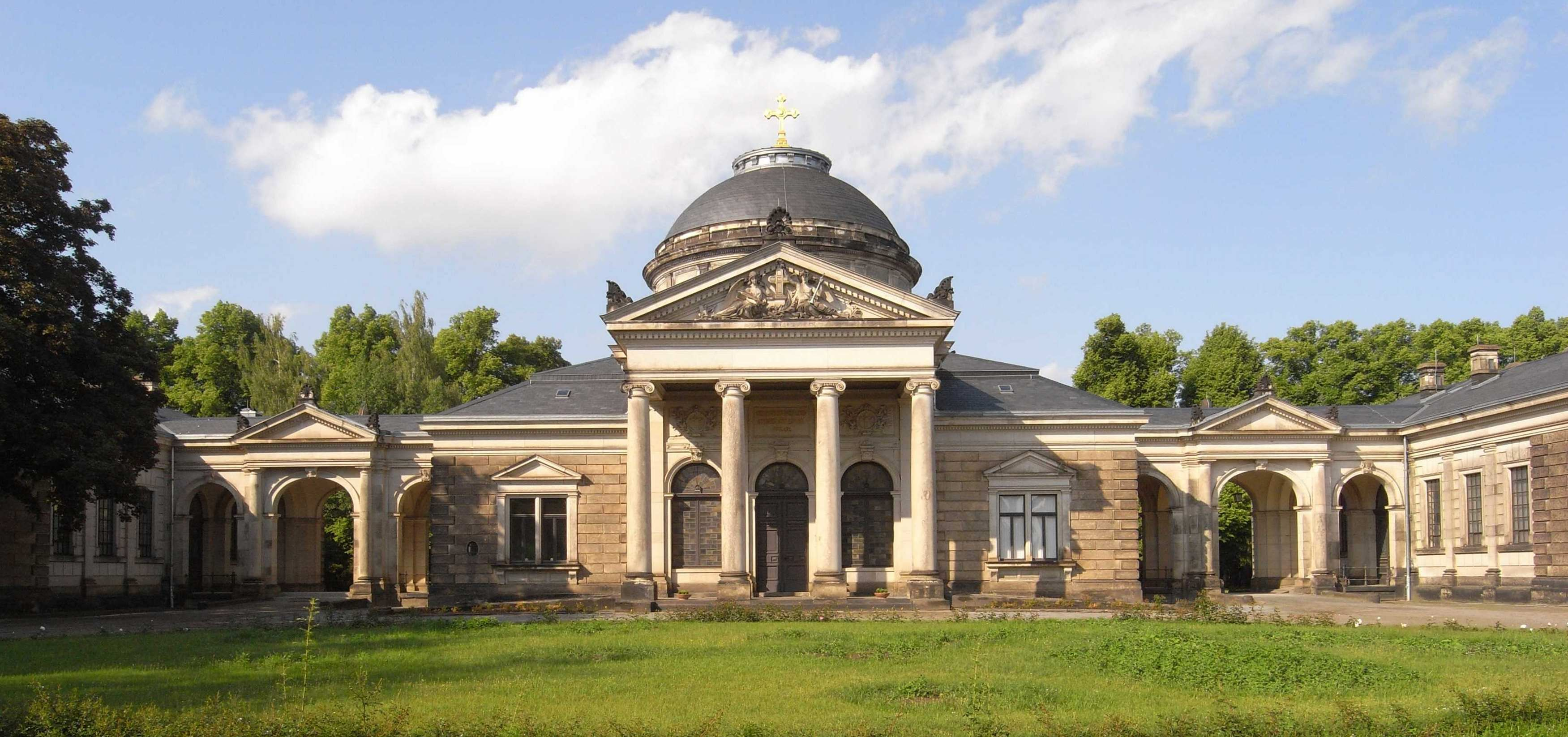 Johannisfriedhof Dresden, Trauerhalle (Parentationshalle) von Paul Wallot (1894)